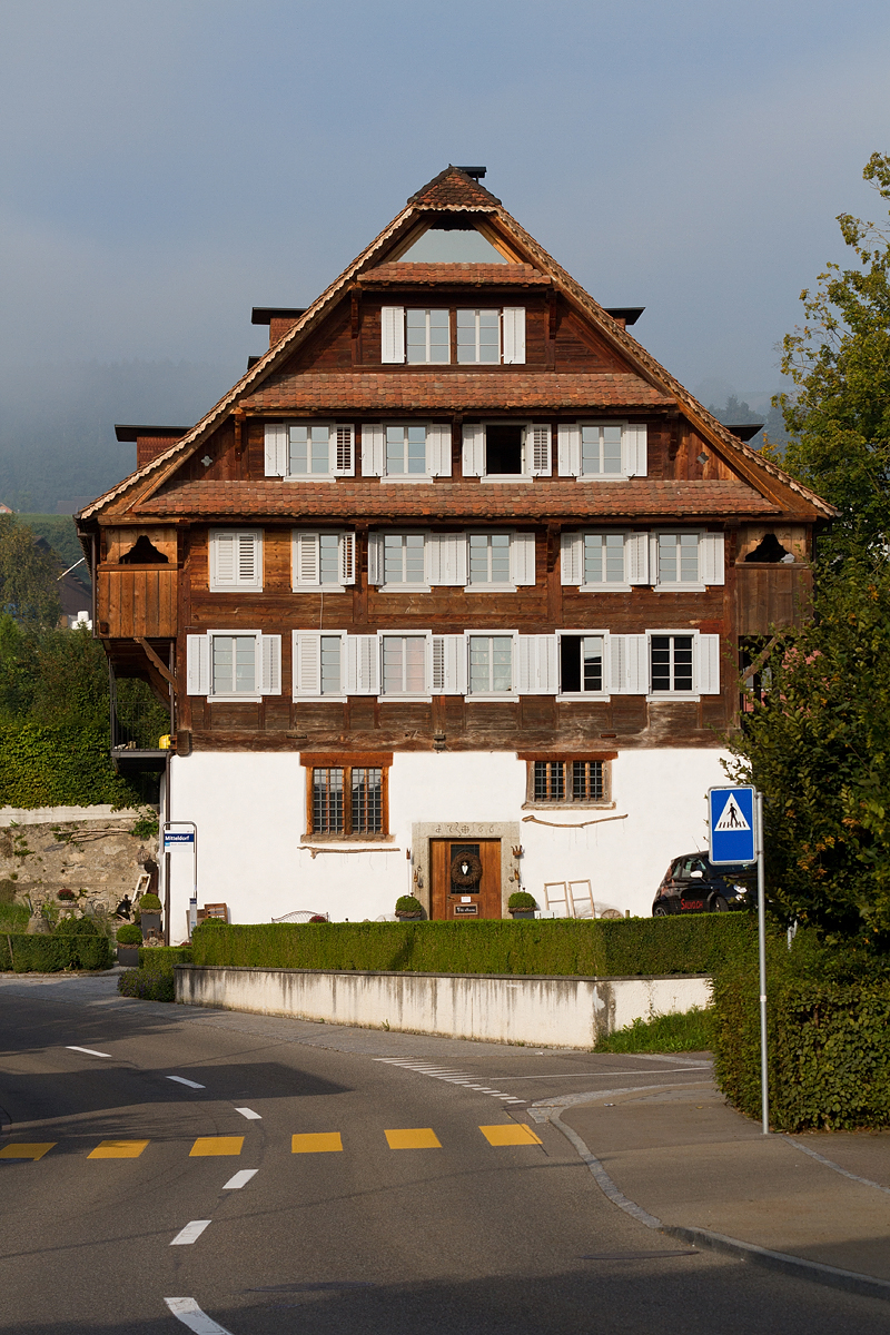 Alte Mühle in Auw (AG) - Kulturgüterschutz Nr. 9822